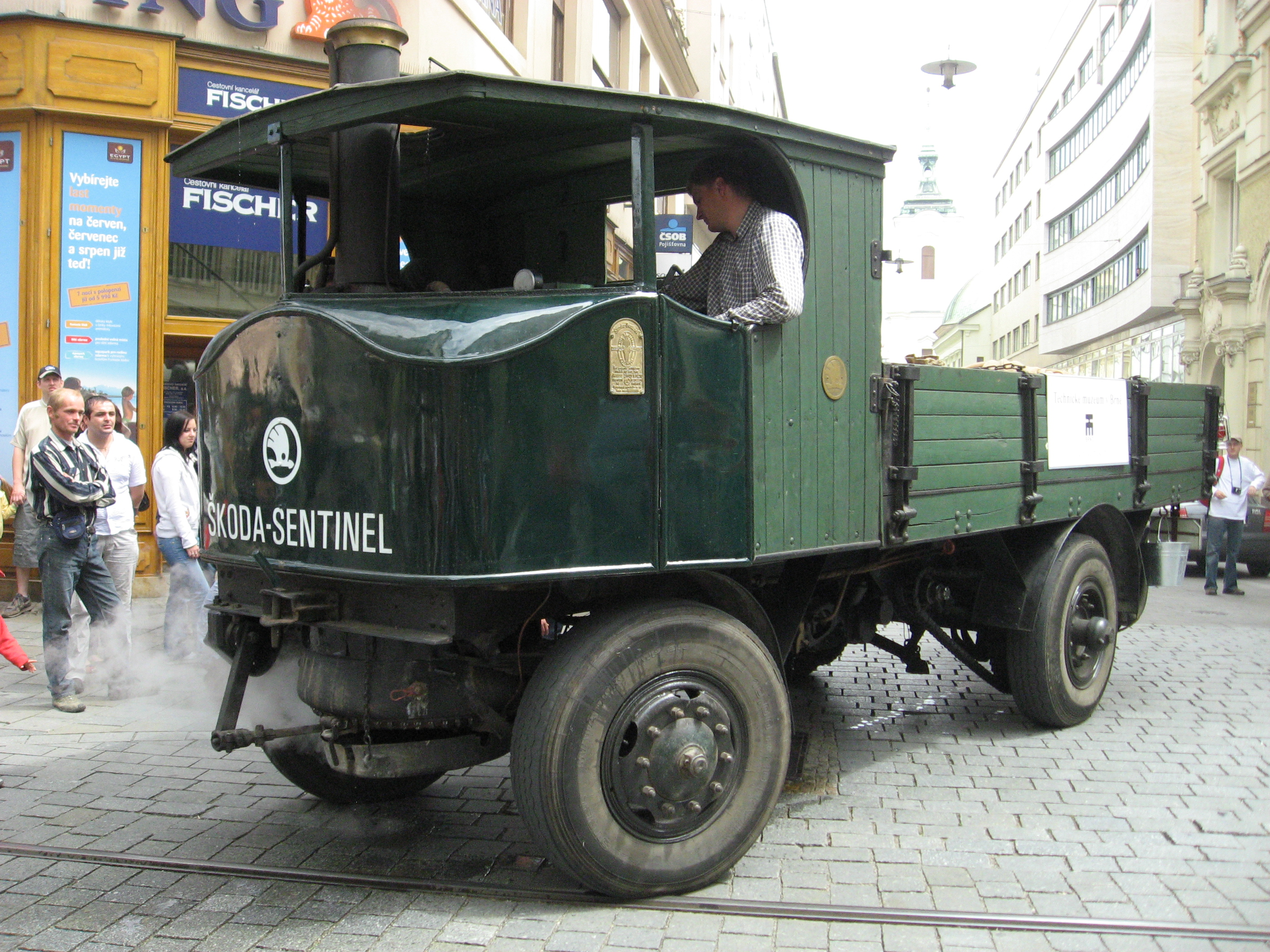 Brno, 140 let MHD